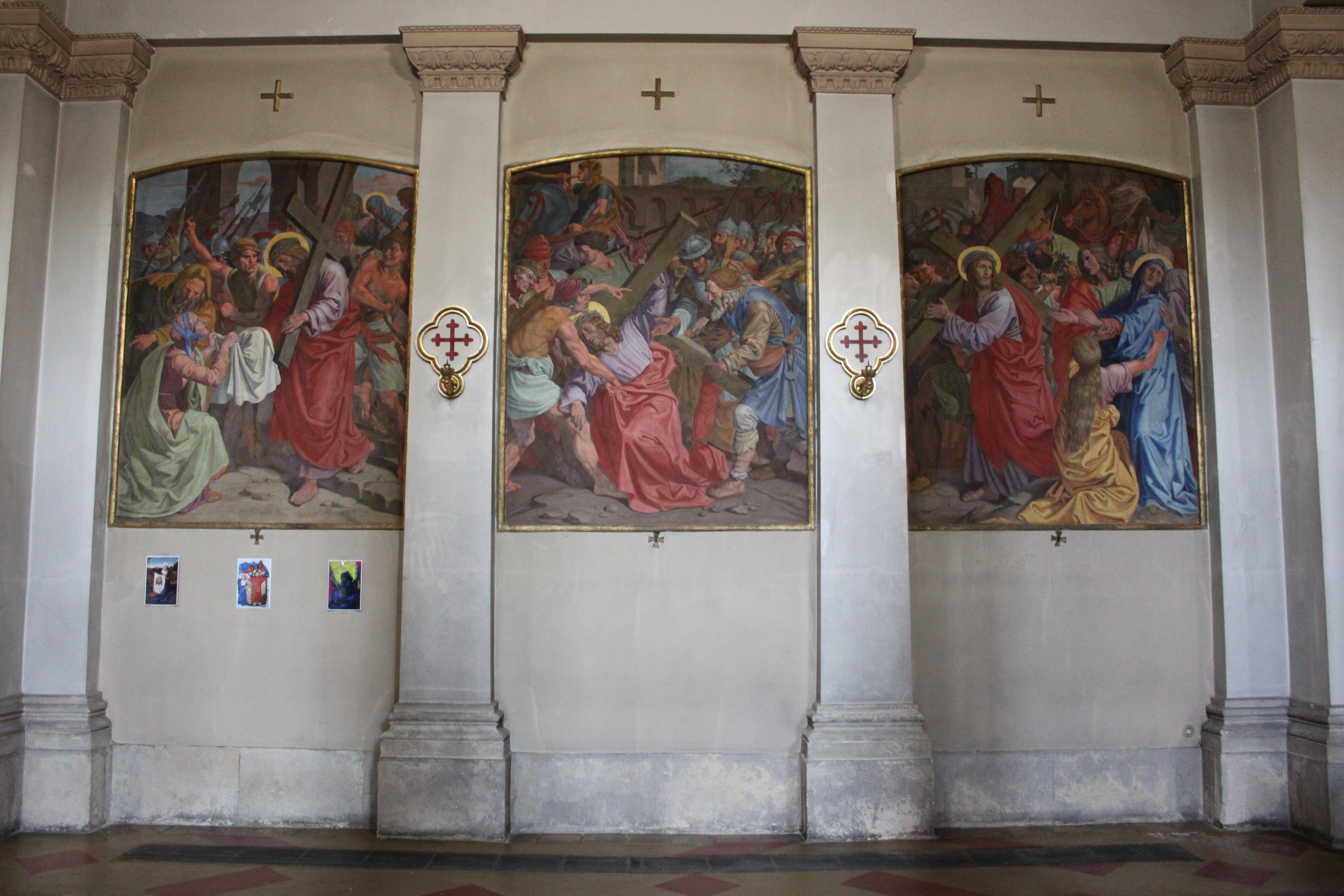 Kath. Pfarrkirche, hl Johannes Nepomuk, Kreuzweg von Joseph von Führich (1844-1846), Drei-Bilder-Kombination